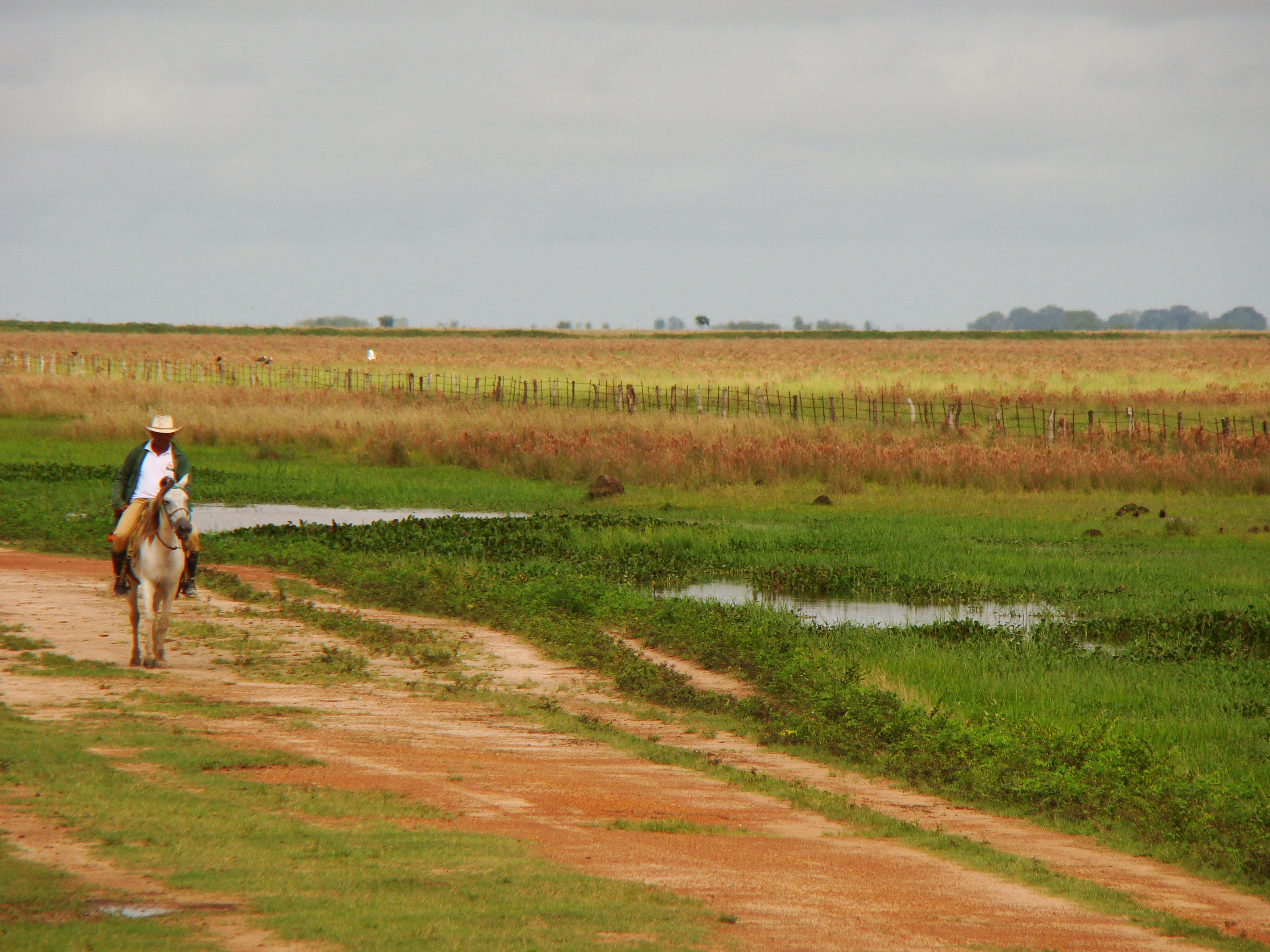 La inmensidad del llano y su llanero